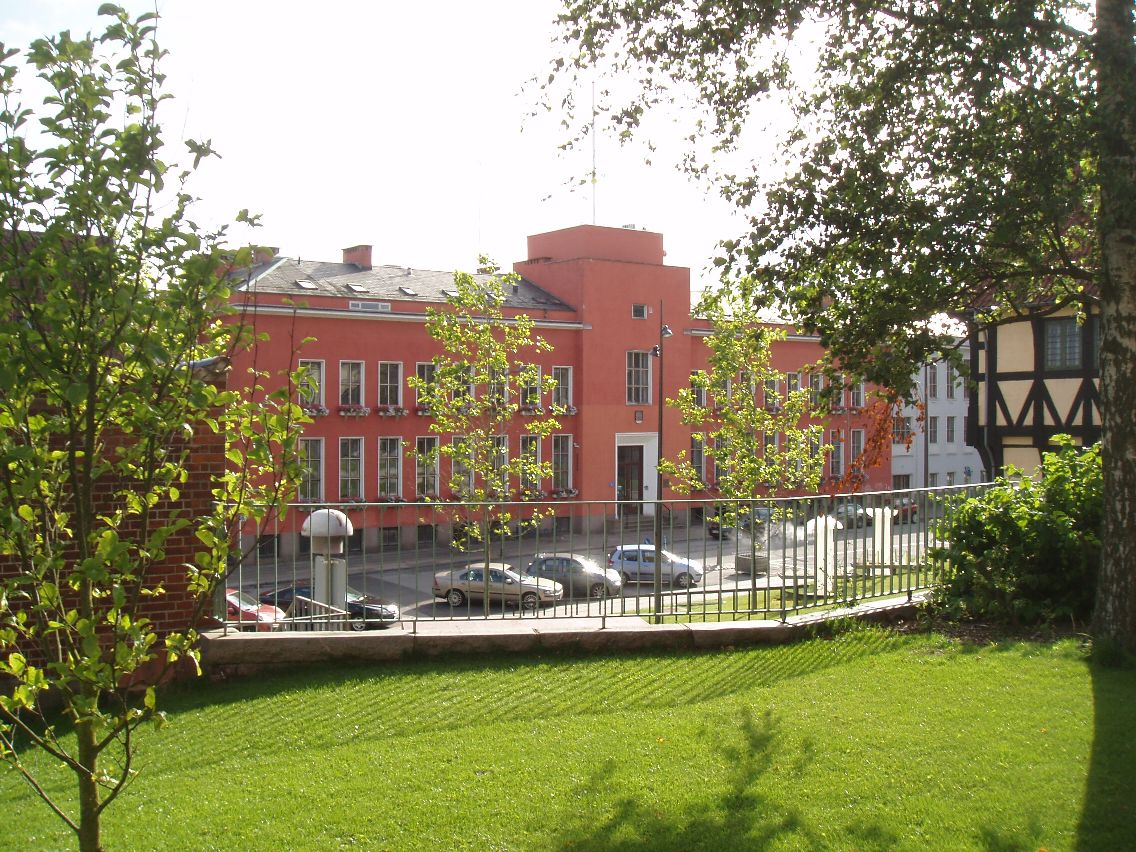 Raadhuset i Svendborg set fra NØ.